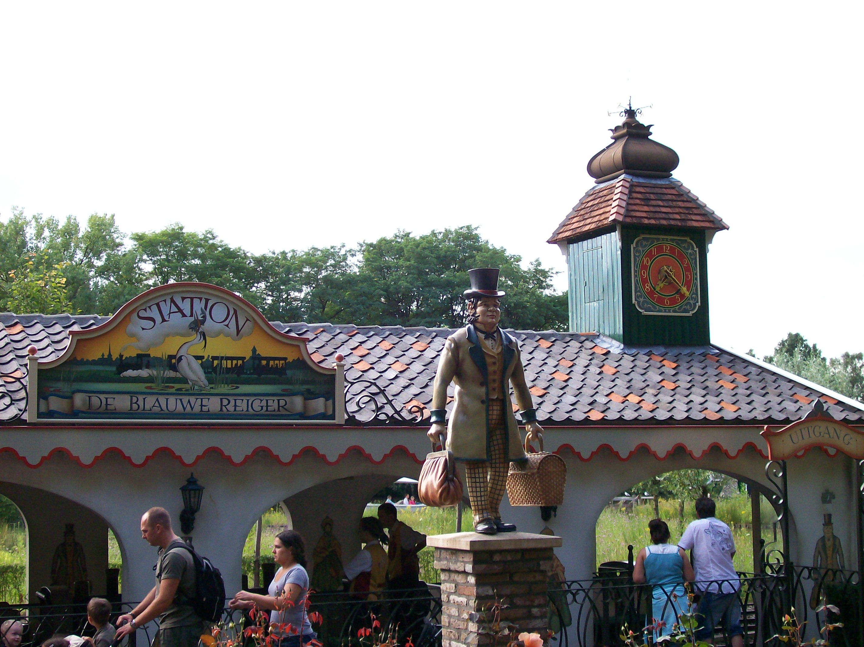 la gare de Kinderspoor